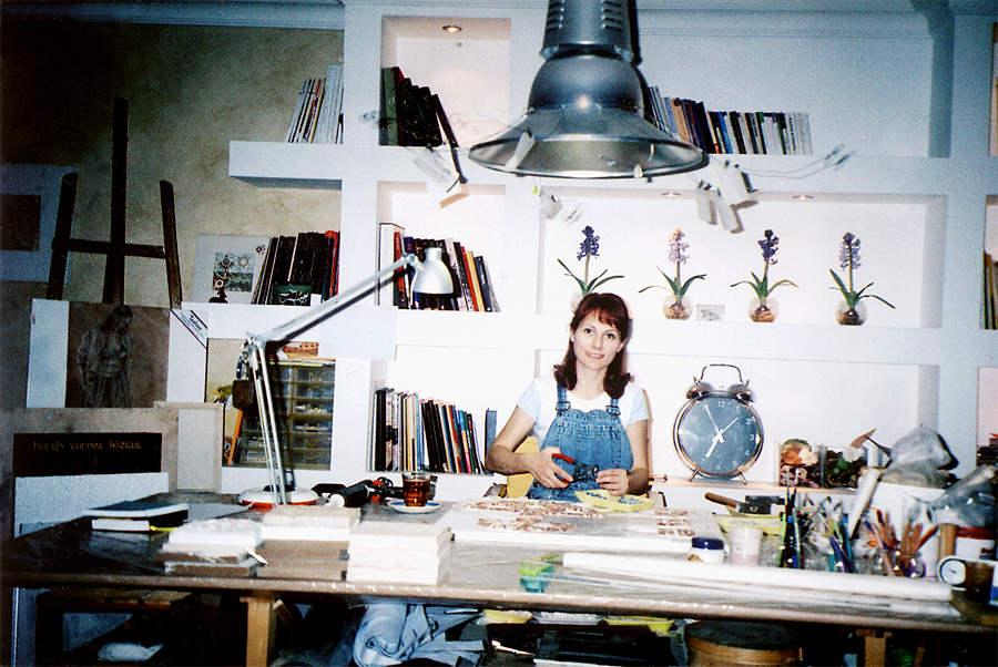 Hülya Vurnal İkizgül Atölyesinde